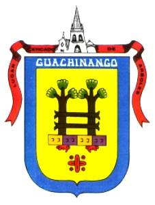 Stemma Guachinango - Jalisco